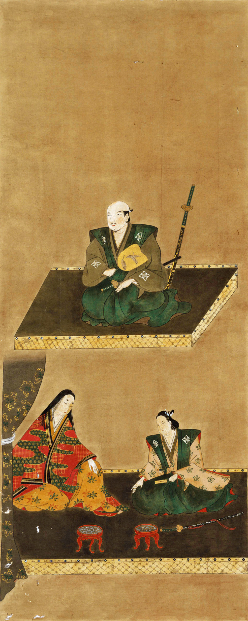 上段・武田勝頼像、下段・北条夫人・信勝像。 原典は和歌山県高野山持明院所蔵。